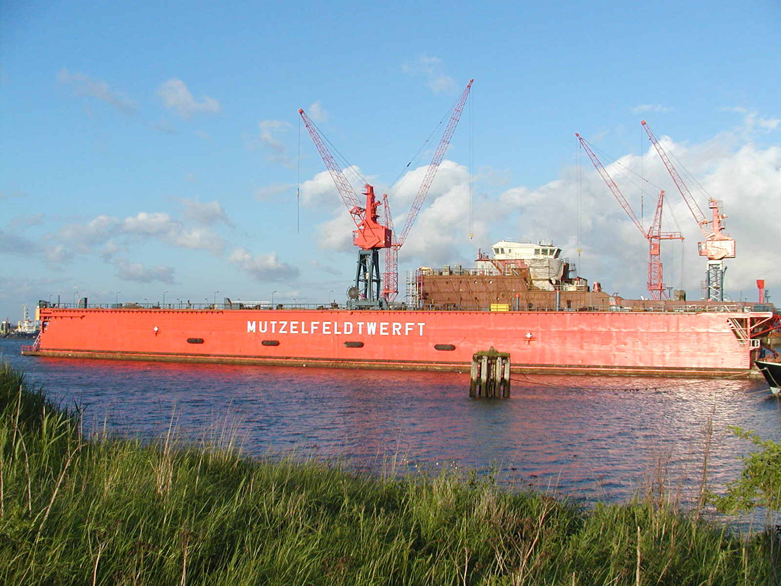 Die Mützefeldwerft